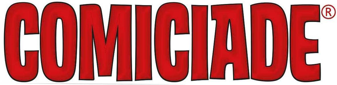 Universal-Logo der Comiciade